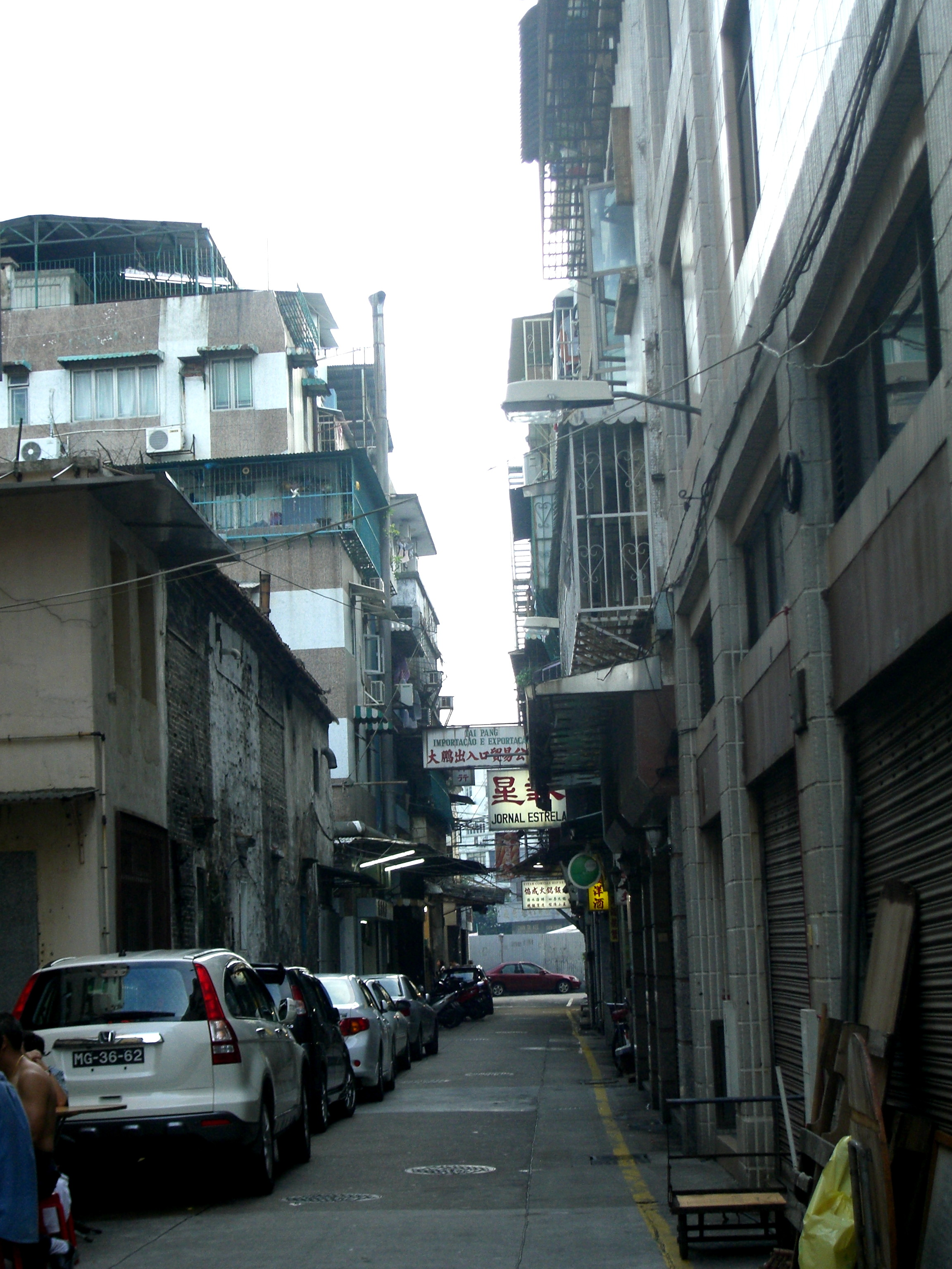 Travessa Da Caldeira